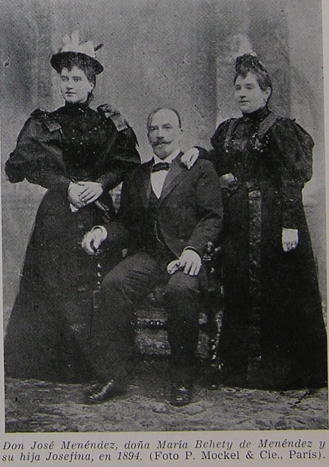 José Menéndez, su esposa María Behety y su hija Josefina Menéndez-Behety fotografiados en París, en 1894, durante su segundo viaje a Europa.